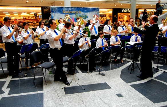 Koncert Krakowskiej Orkiestry Staromiejskiej, 2010-03-27